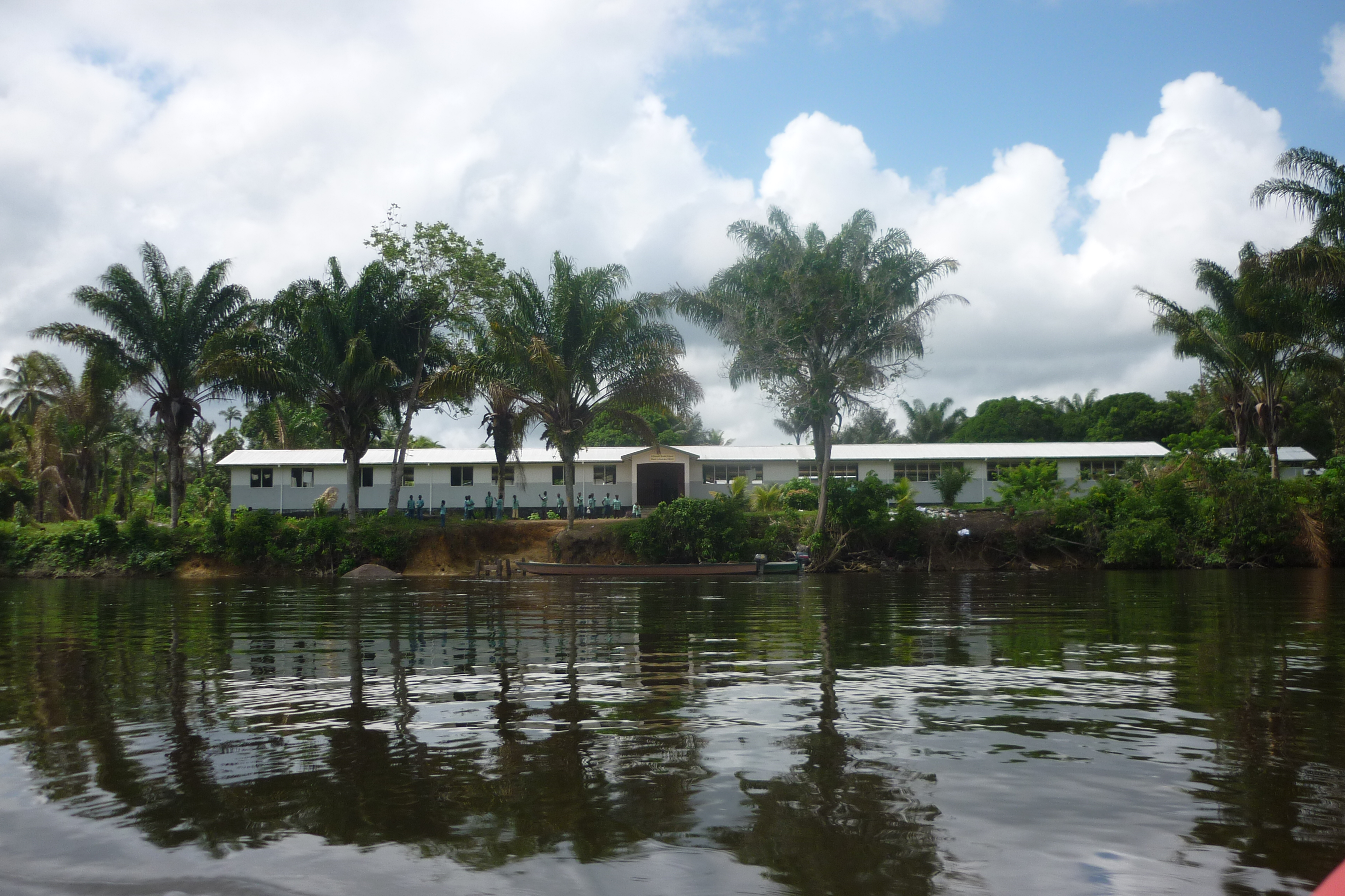 School in Aurora (Suriname)